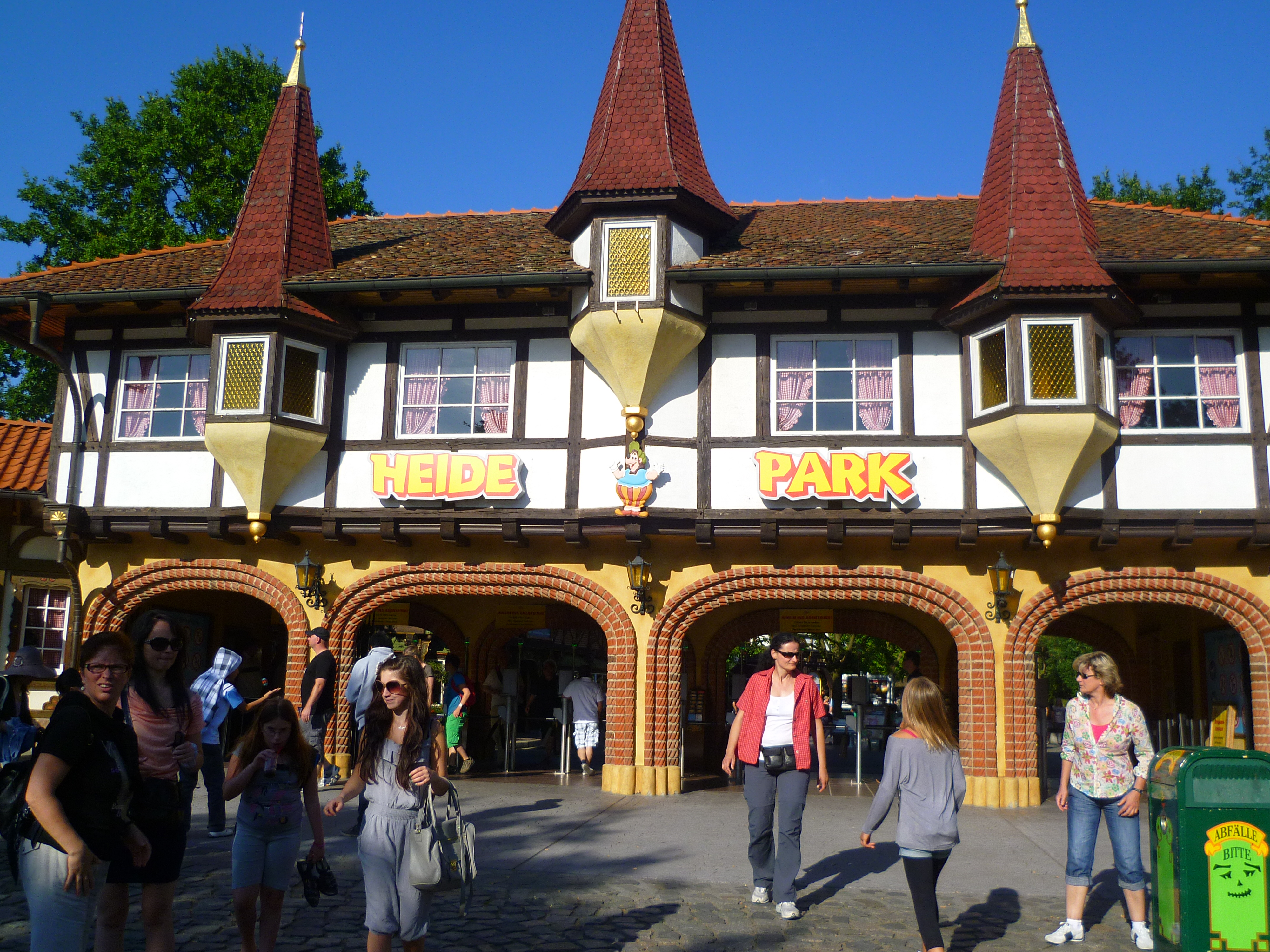 Eingang des Heide-Park Resorts.